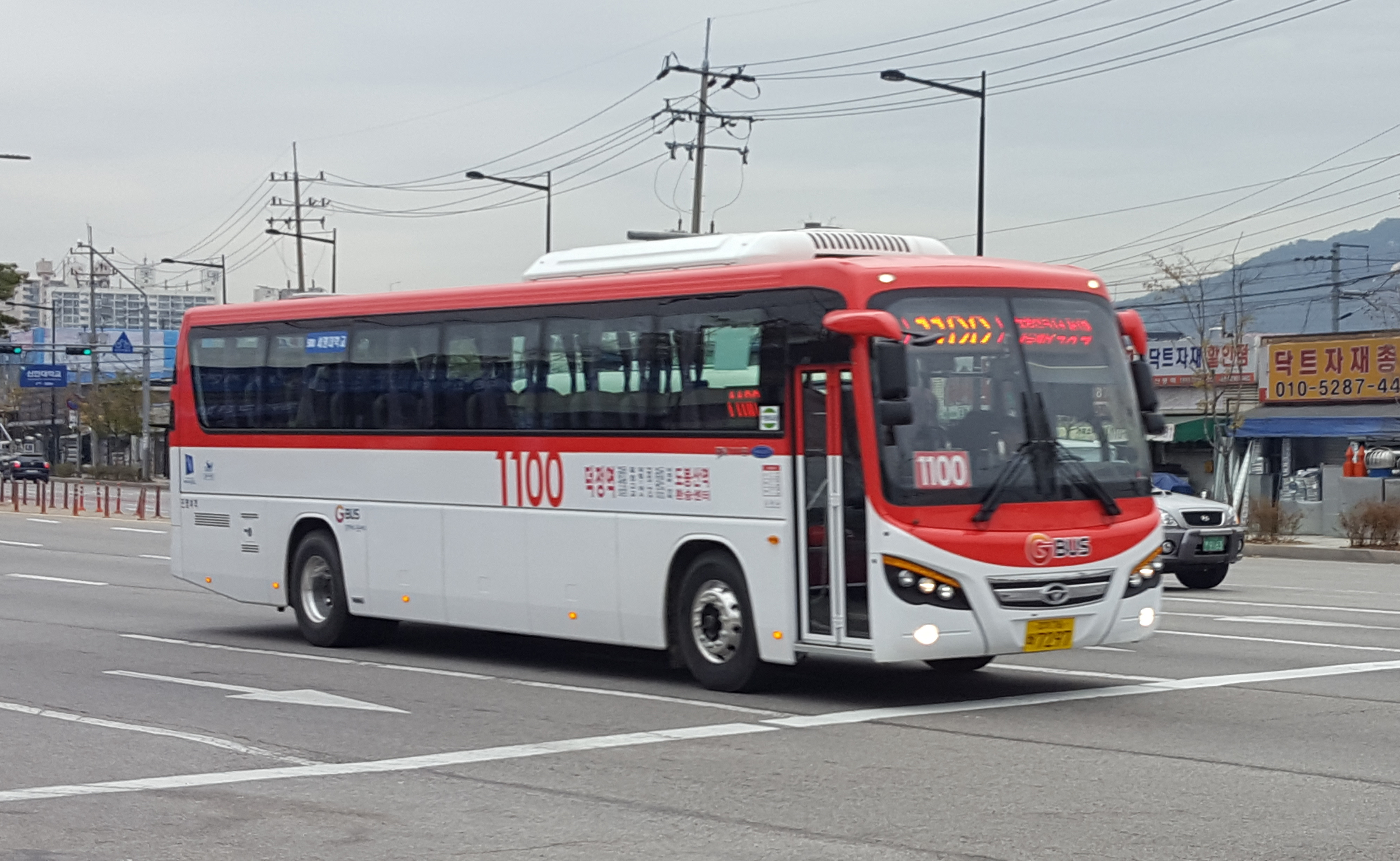 양주시 직행좌석버스 1100번